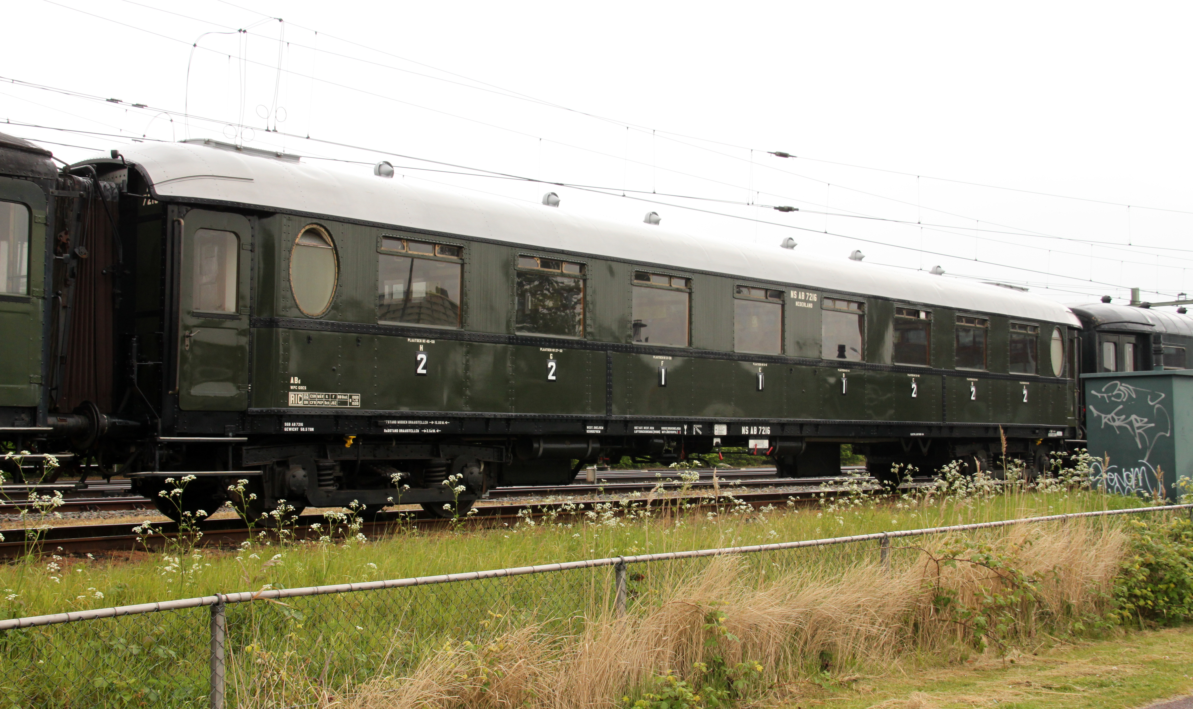 Een Ovalen rijtuig, in het bezit van de SGB, te Goes.